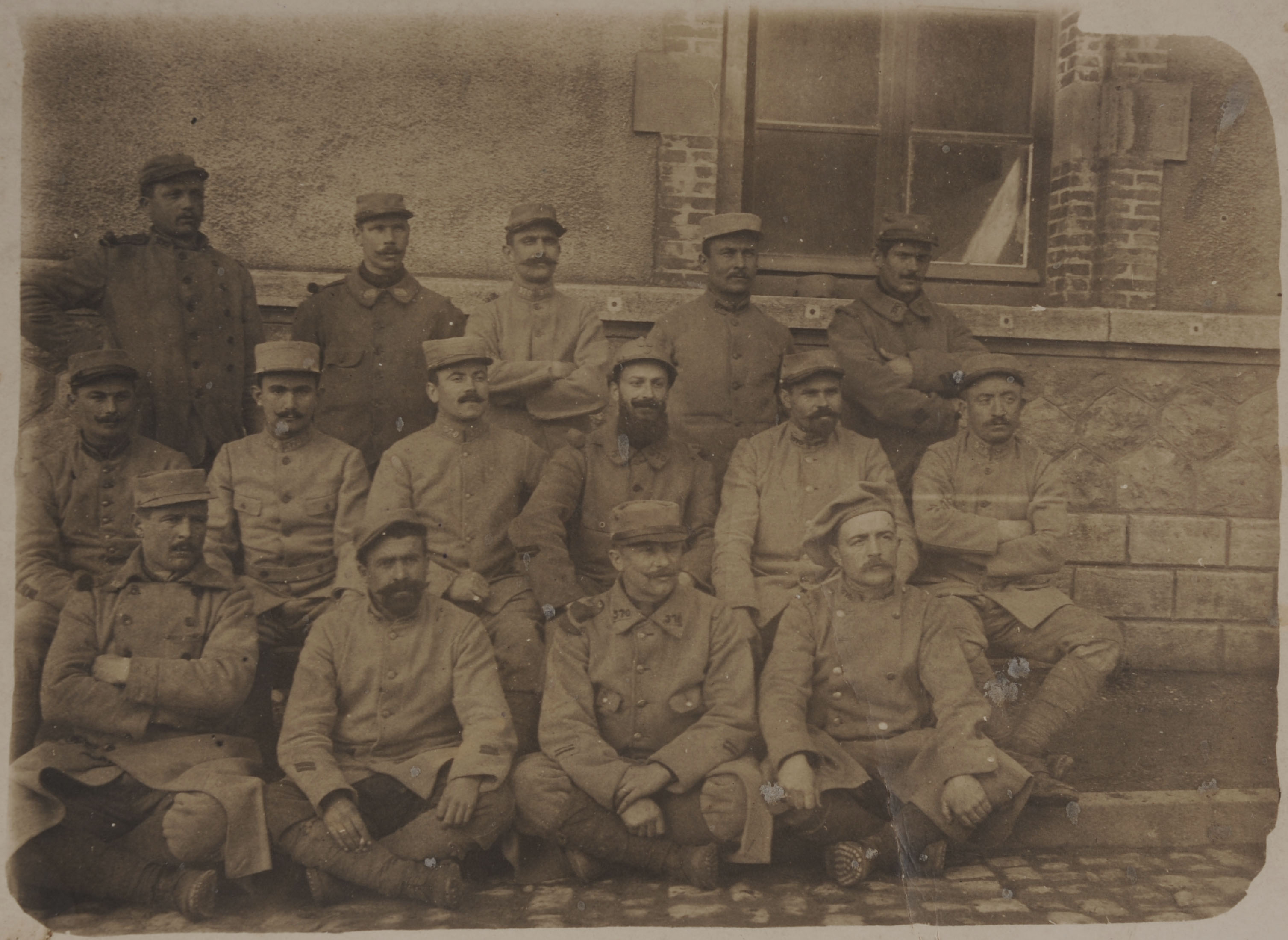 Portrait de soldats du 370e régiment d'infanterie : photographie [1915-1916]